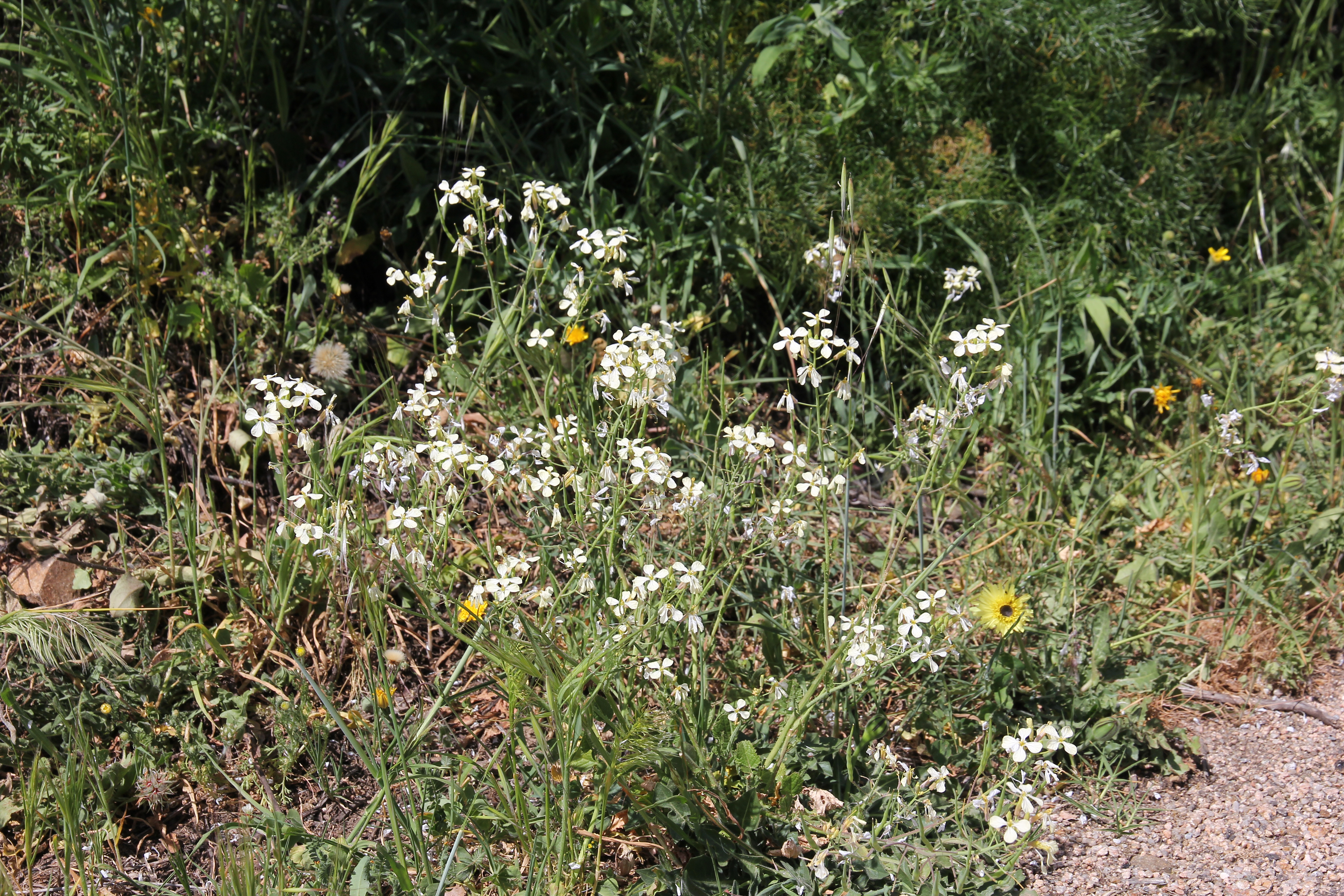 Raphanus raphanistrum in Sardinia